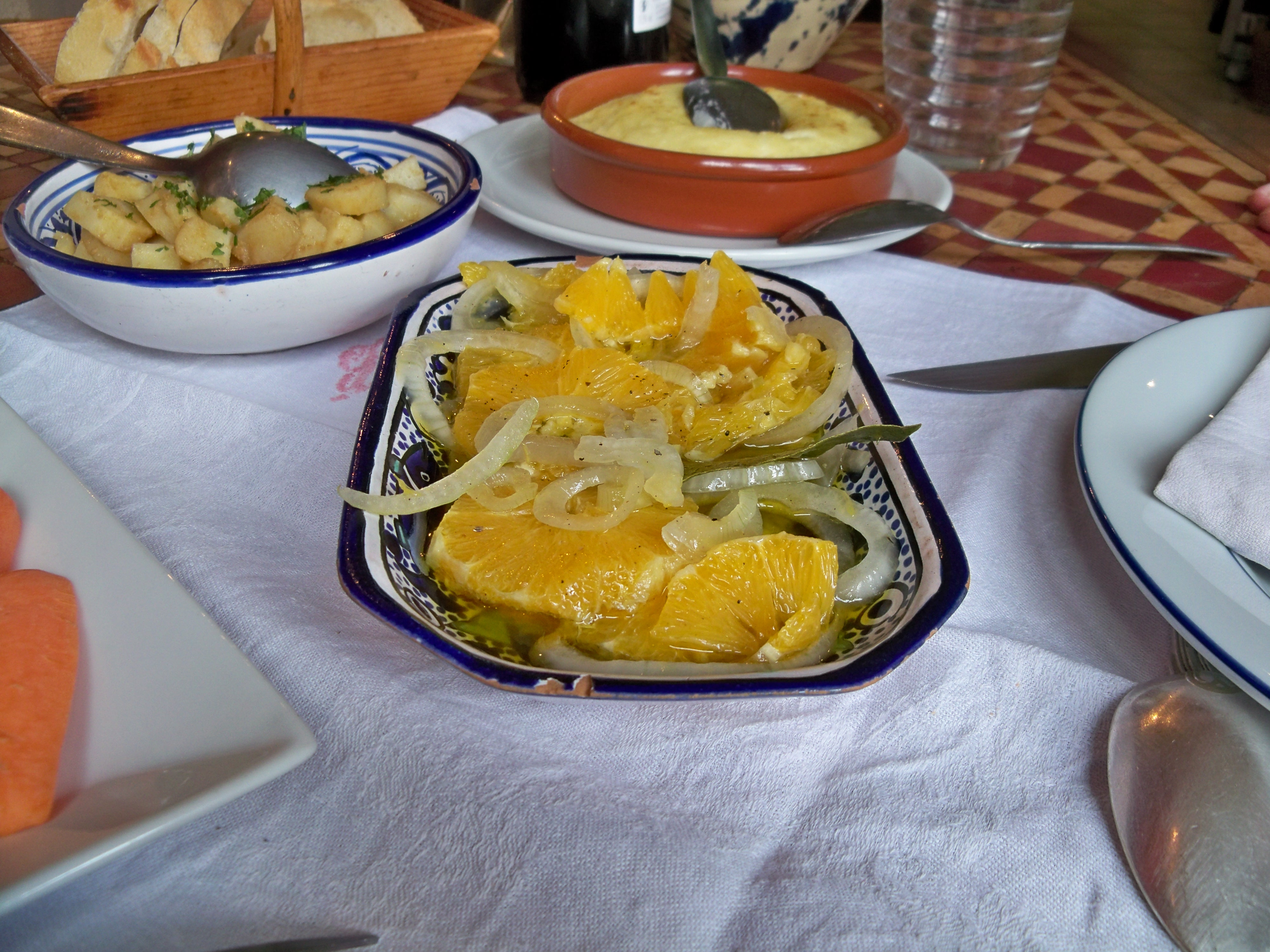 au bistot de pays de Lardiers (04)